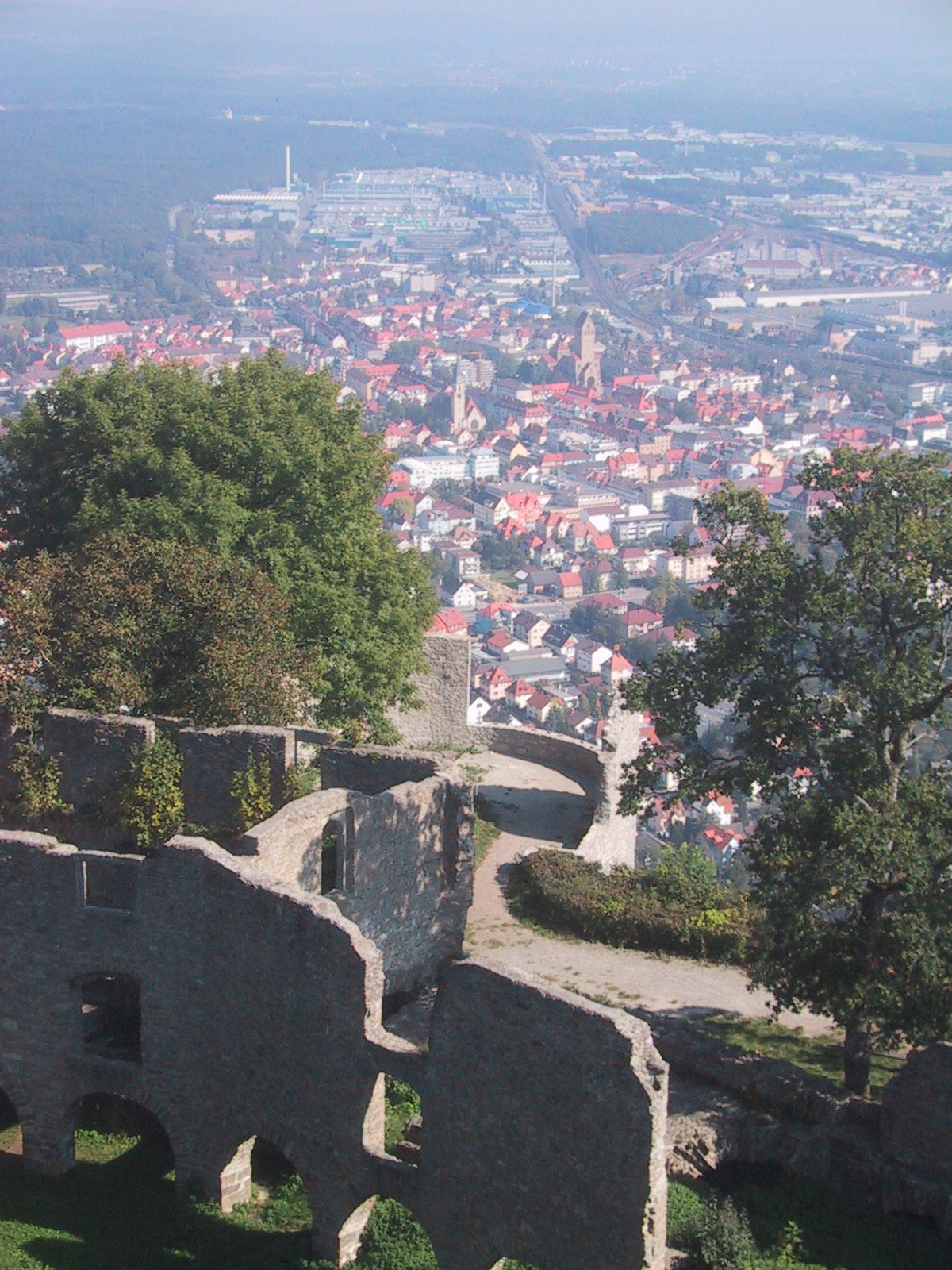 Ruine Hohentwiel mit Sicht auf Singen.